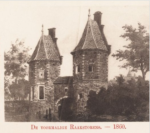 Prent van de Raakstorens in Haarlem in 1860 door een onbekende kunstenaar